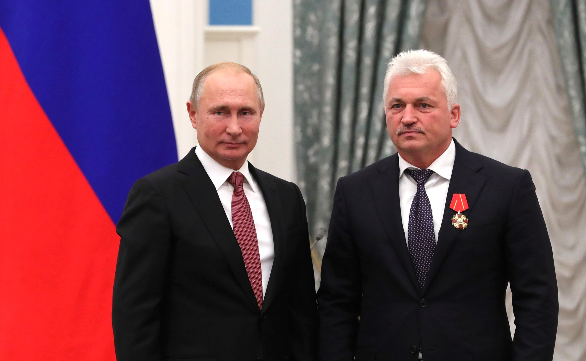 Вручение государственных наград. Орденом Александра Невского награждён президент Всероссийской федерации самбо Сергей Елисеев.